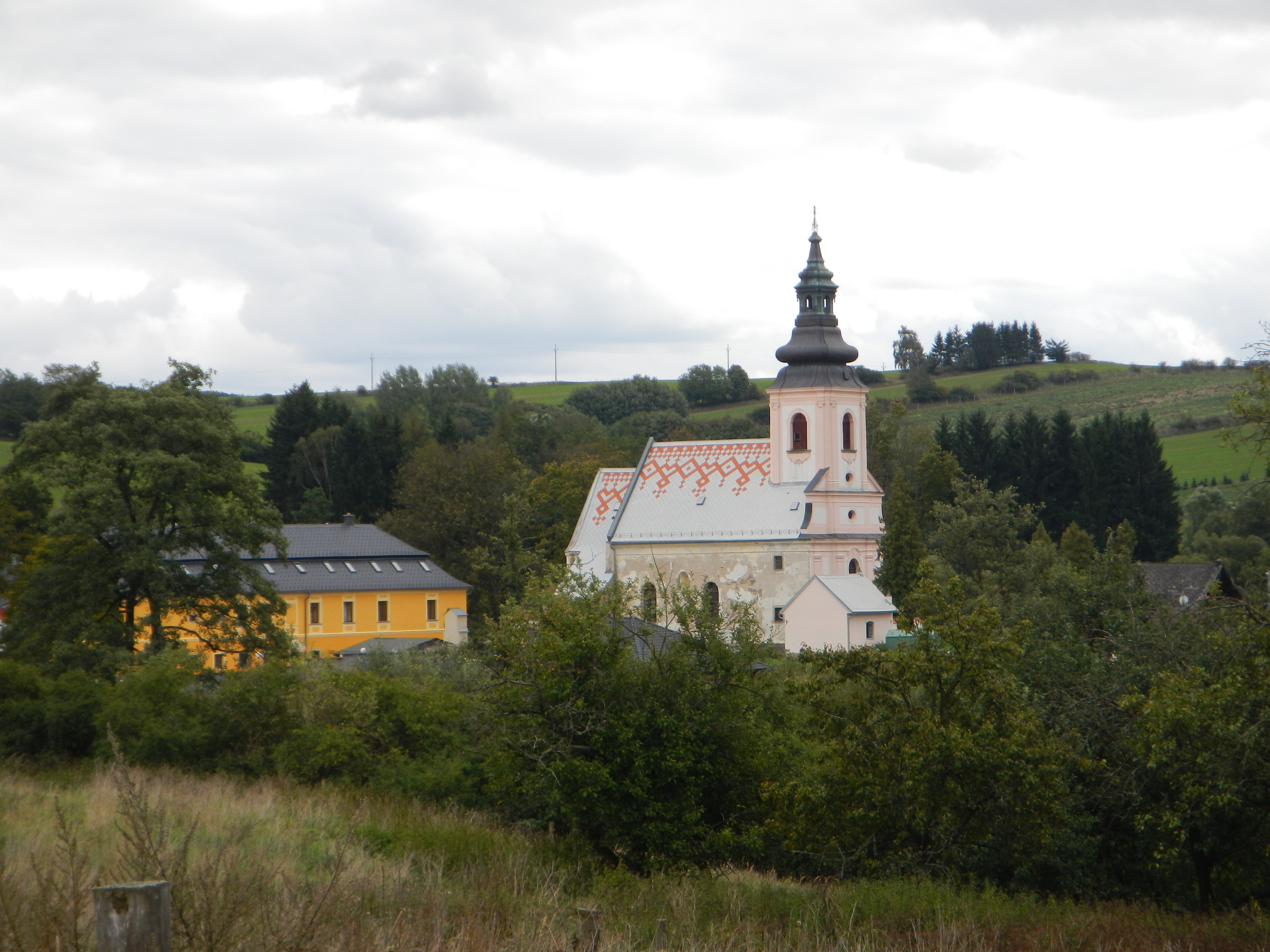 Kostel sv. Petra a Pavla (Rančířov), SV část obce, Rančířov